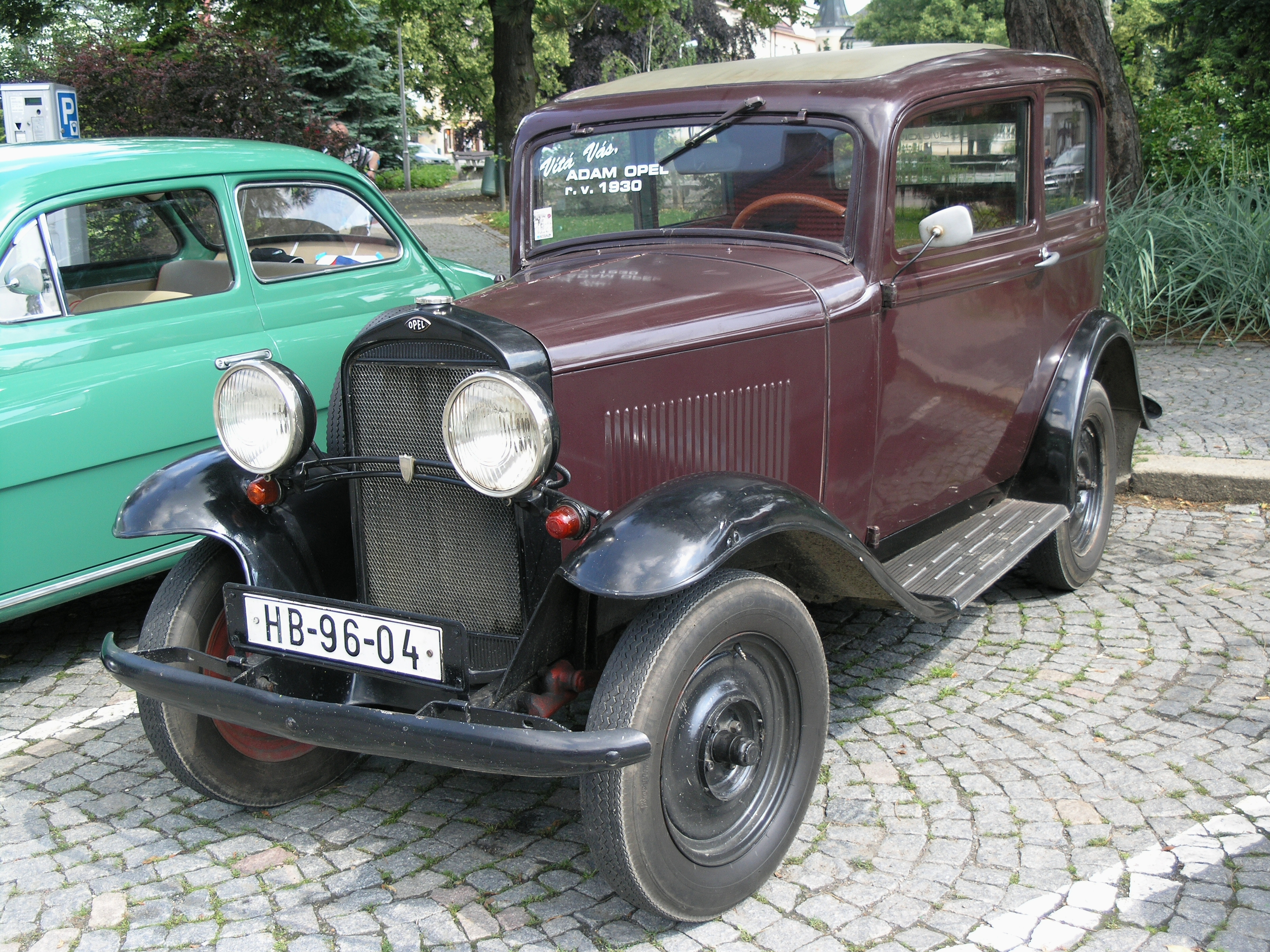 Chotěboř, historický automobil na náměstí T. G. Masaryka.